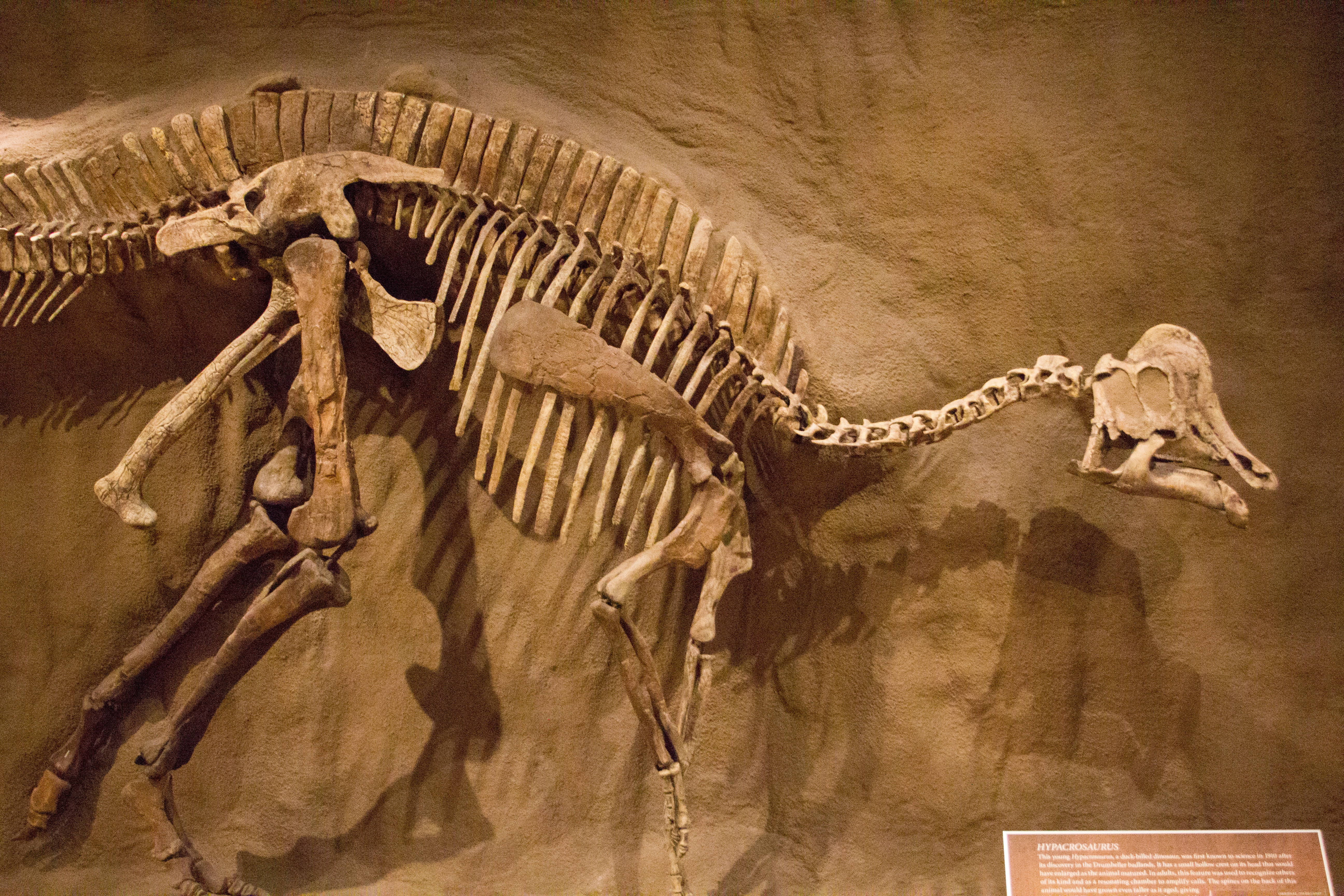 2ti-drumheller-last-day-20120804-20.jpg